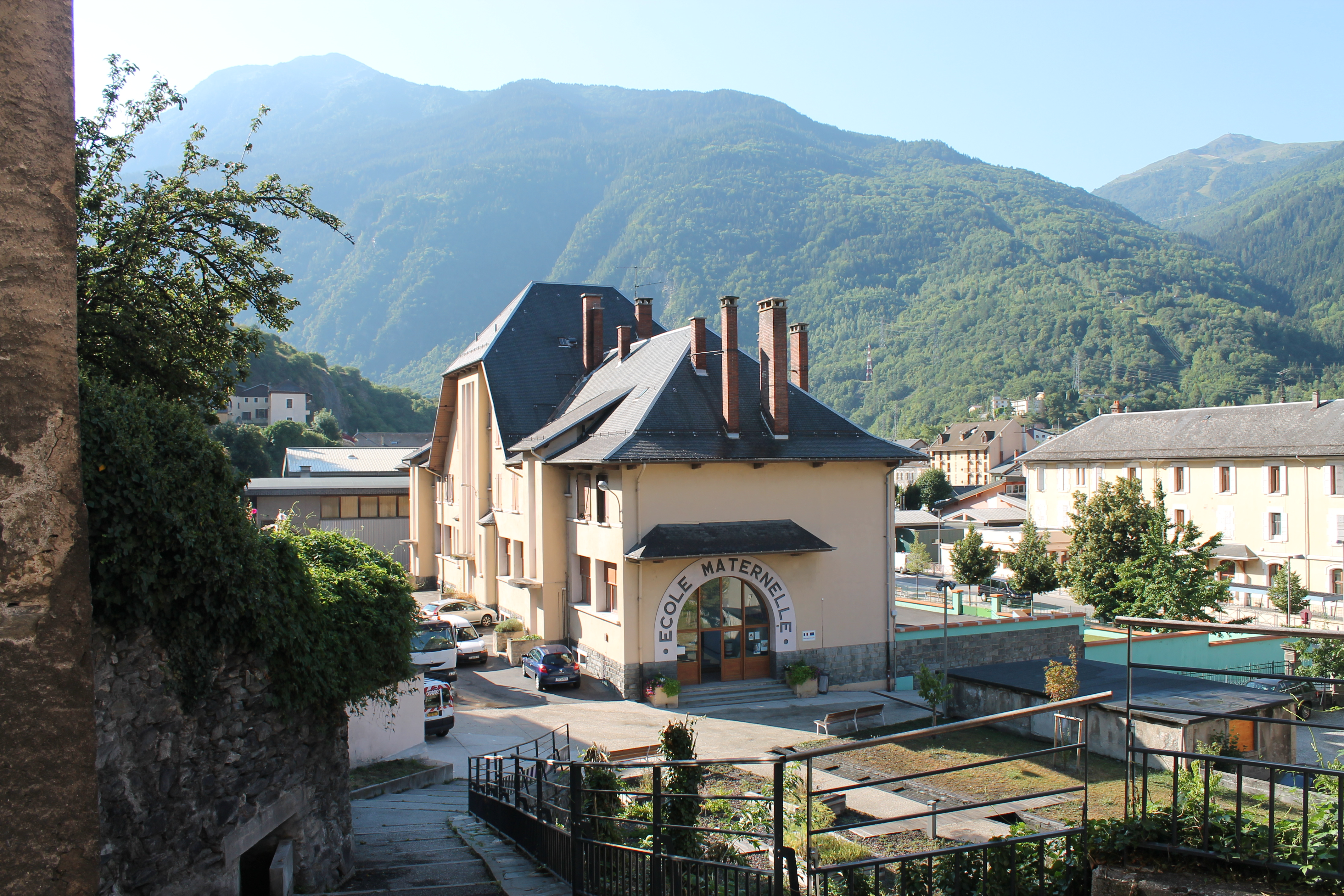 Ecole de Saint-Michel-de-Maurienne (août 2018).